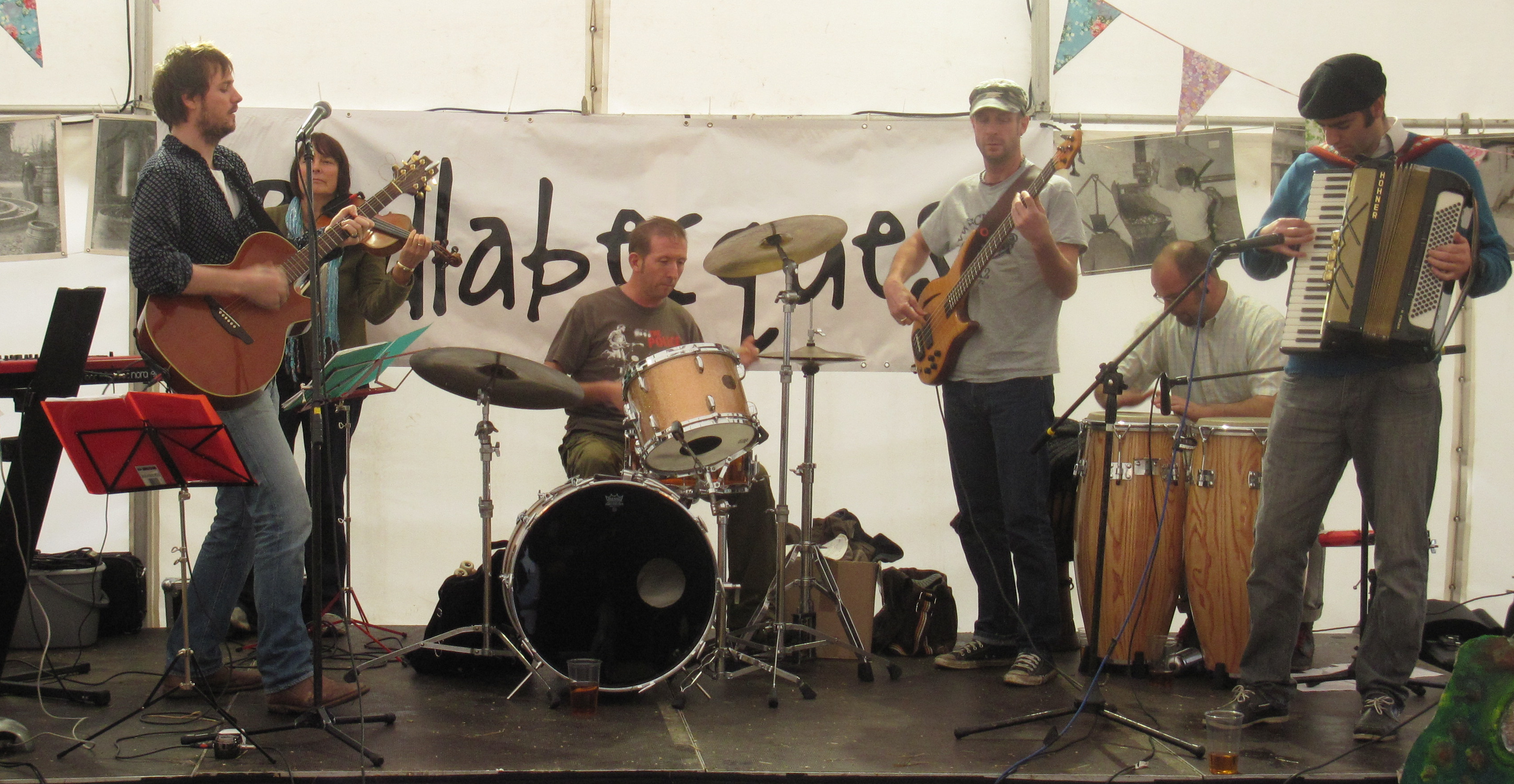 Nrf: Badlabecques, Faîs'sie d'Cidre, Octobre 2012, Jèrri